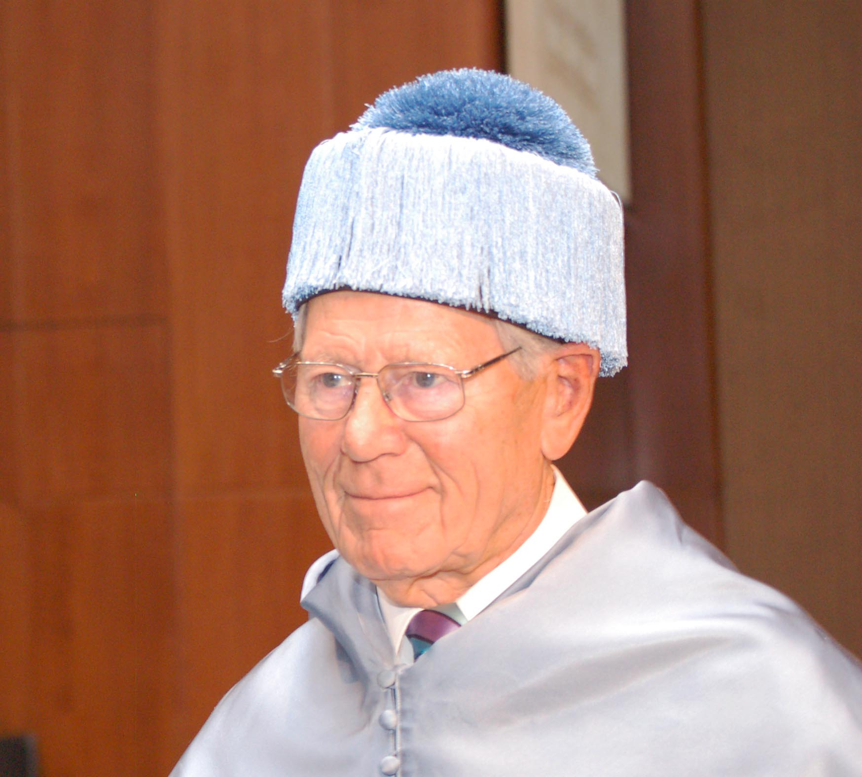 Hans Küng investido Doctor Honoris Causa en la Universidad Nacional de Educación a Distancia (UNED).